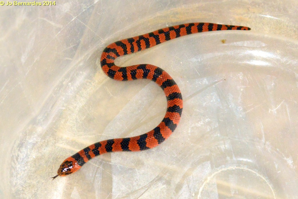 Exemplar juvenil de falsa-coral (atractus thirhedrurus), encontrada no bioma Mata Atlântica a 650 m de altitude no município de Juquitiba - São Paulo - Brasil.